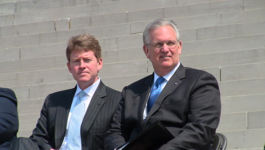 KosterNixon